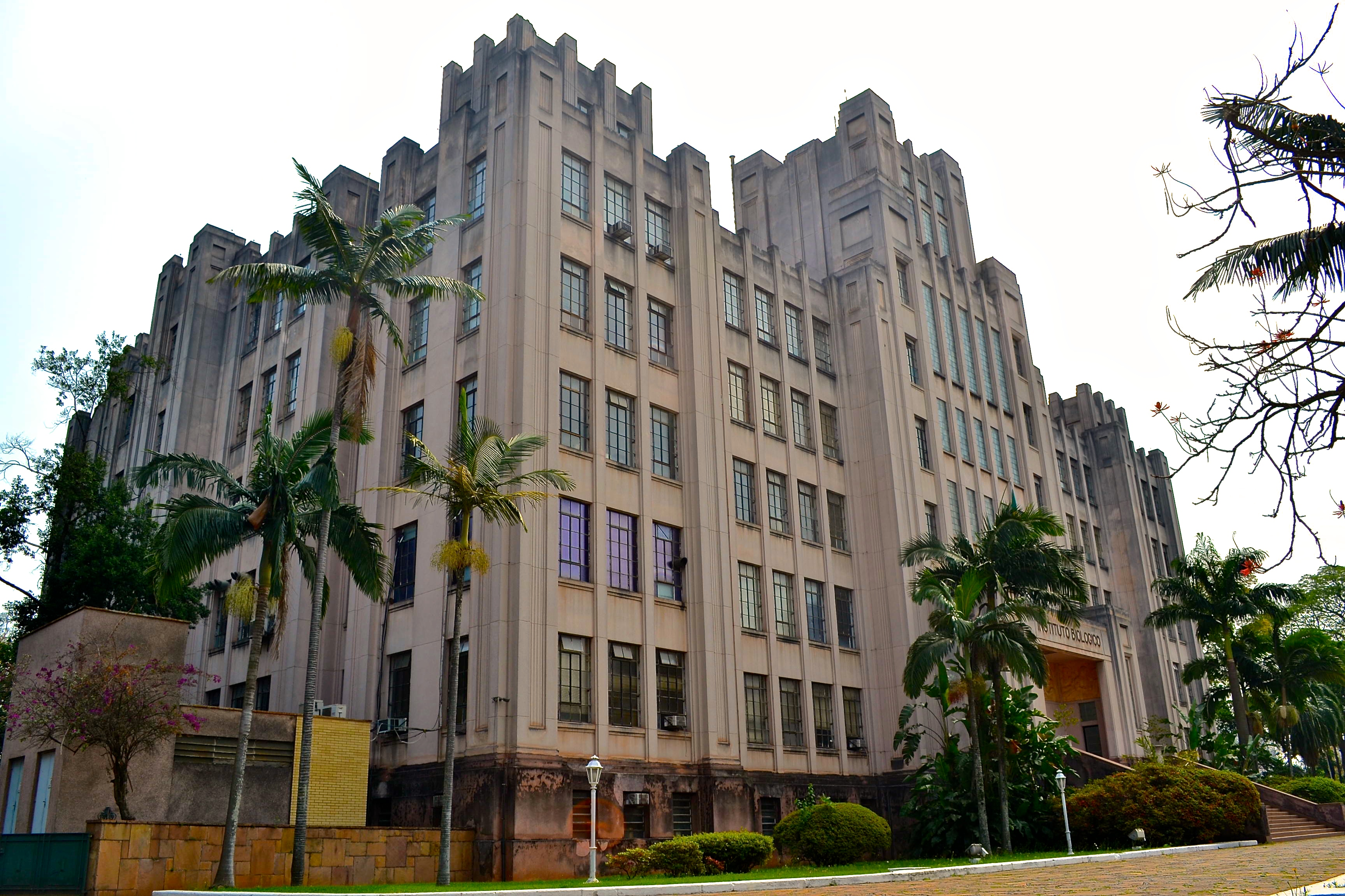 Fachada principal do prédio do instituto Biológico, em São Paulo (SP), Brasil.